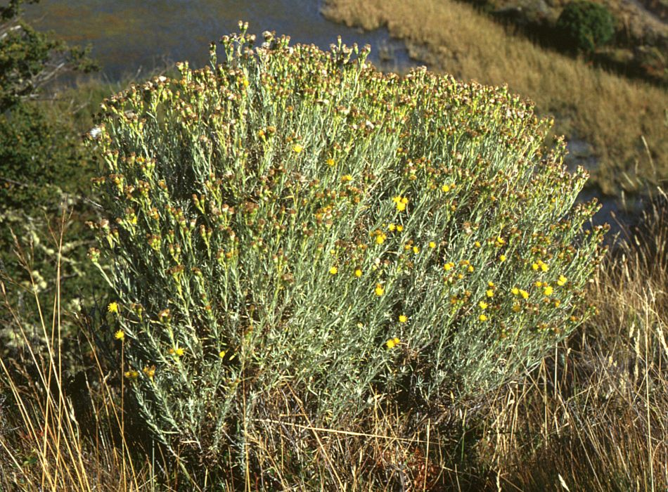 Senecio patagonicus var. alyssoides, Korbblütler (Asteraceae) - Chile, Patagonien/Patagonia, Parque Nacional Torres del Paine, bei Posada Río Serrano